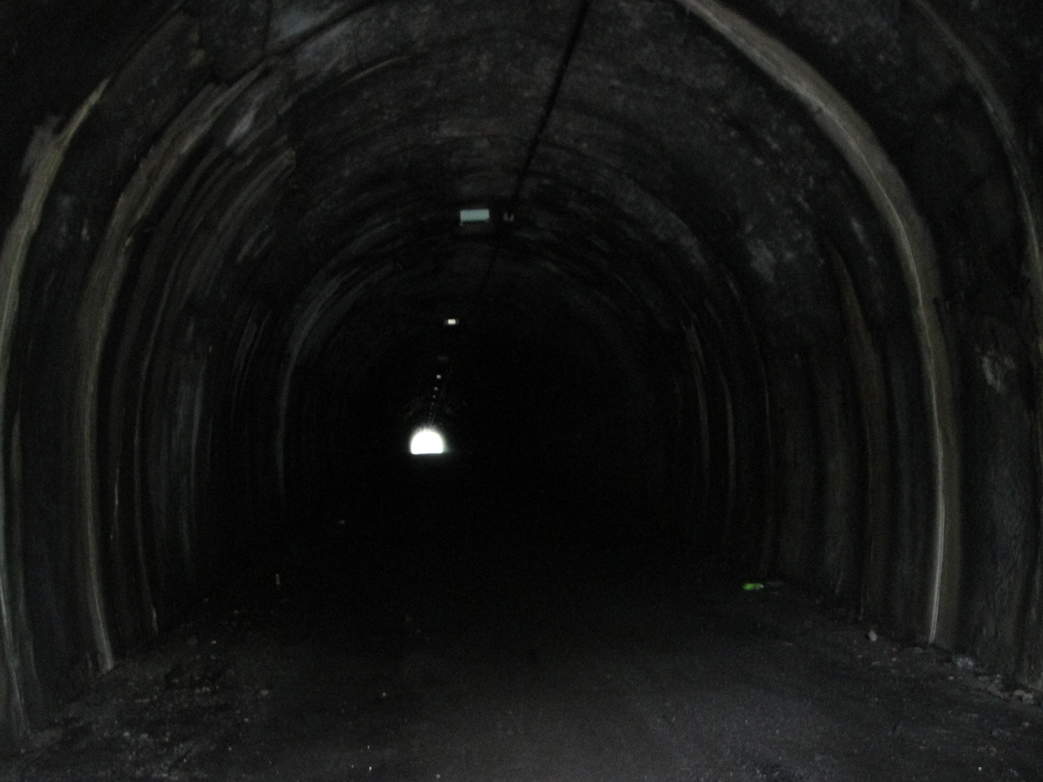 東京都青梅市の旧吹上トンネル内部(照明が消えた状態)